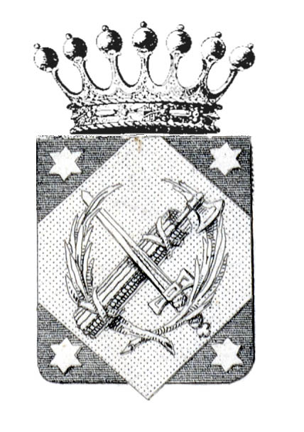 Wiener Stadt und Landesarchiv, Familienarchiv